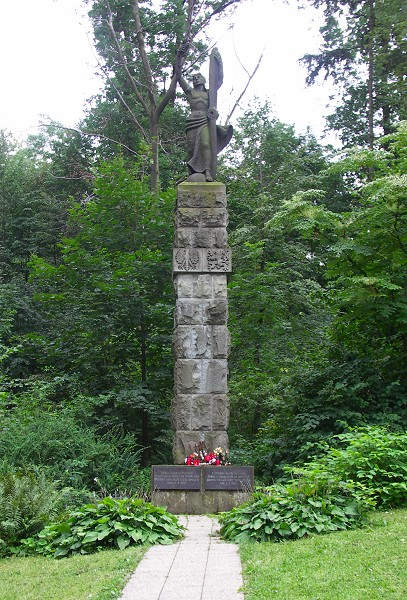 Pomnik na miejscu tragicznej śmierci pilotów Franciszka Żwirki i Stanisława Wigury na Żwirkowisku w Cierlicku (Czechy). Czeski rzeźbiarz Julius Pelikán. Autor: Maciej Dembiniok 2005